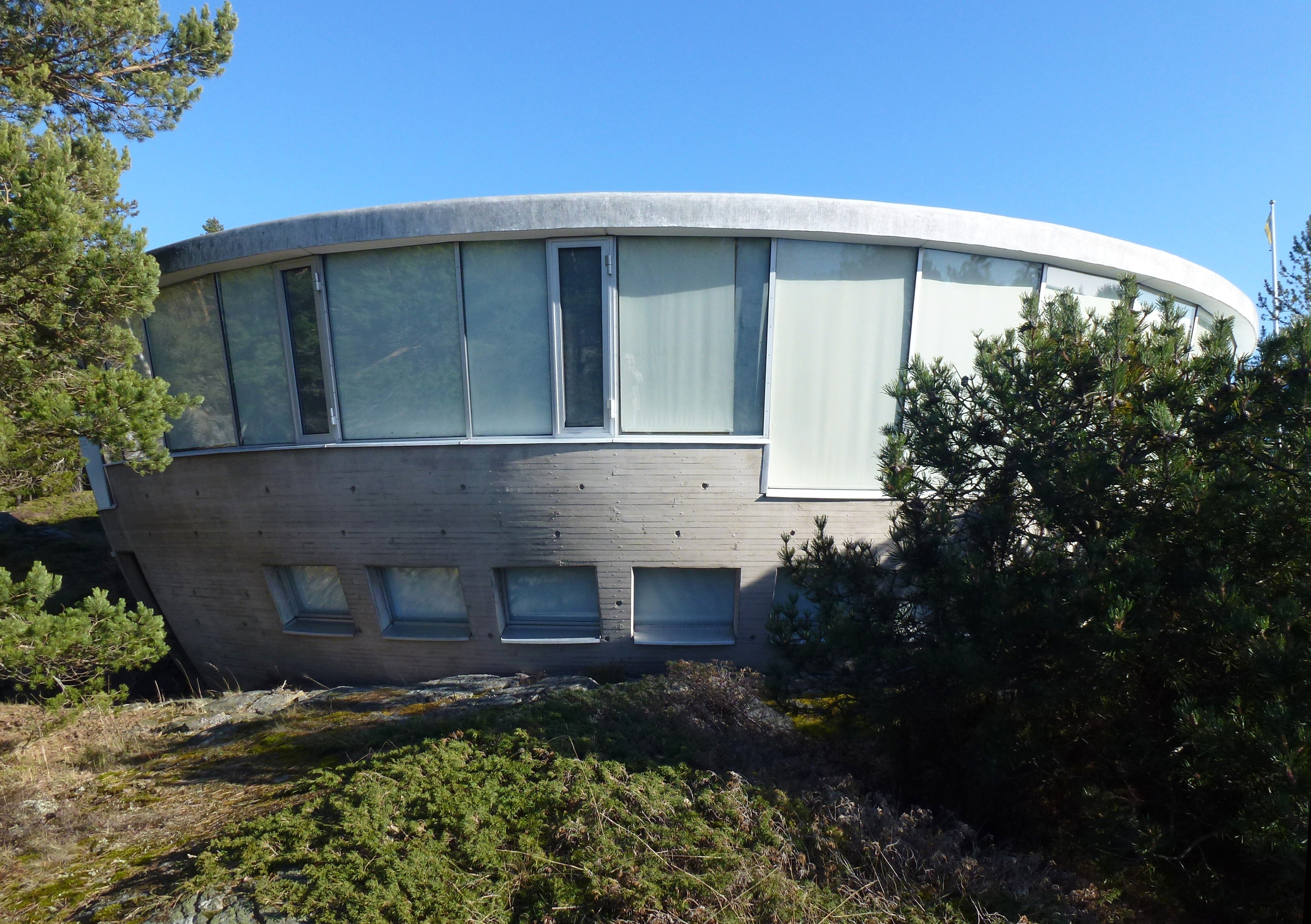 Villa Spies, Älghammar, Nynäshamns kommun